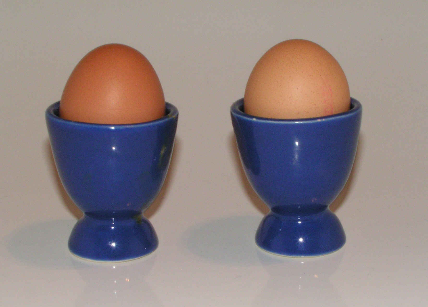 Boiled eggs